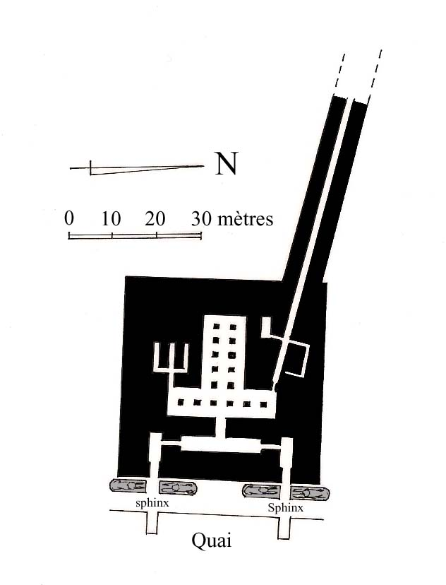 Temple d'acceuil de la pyramide de Khephren